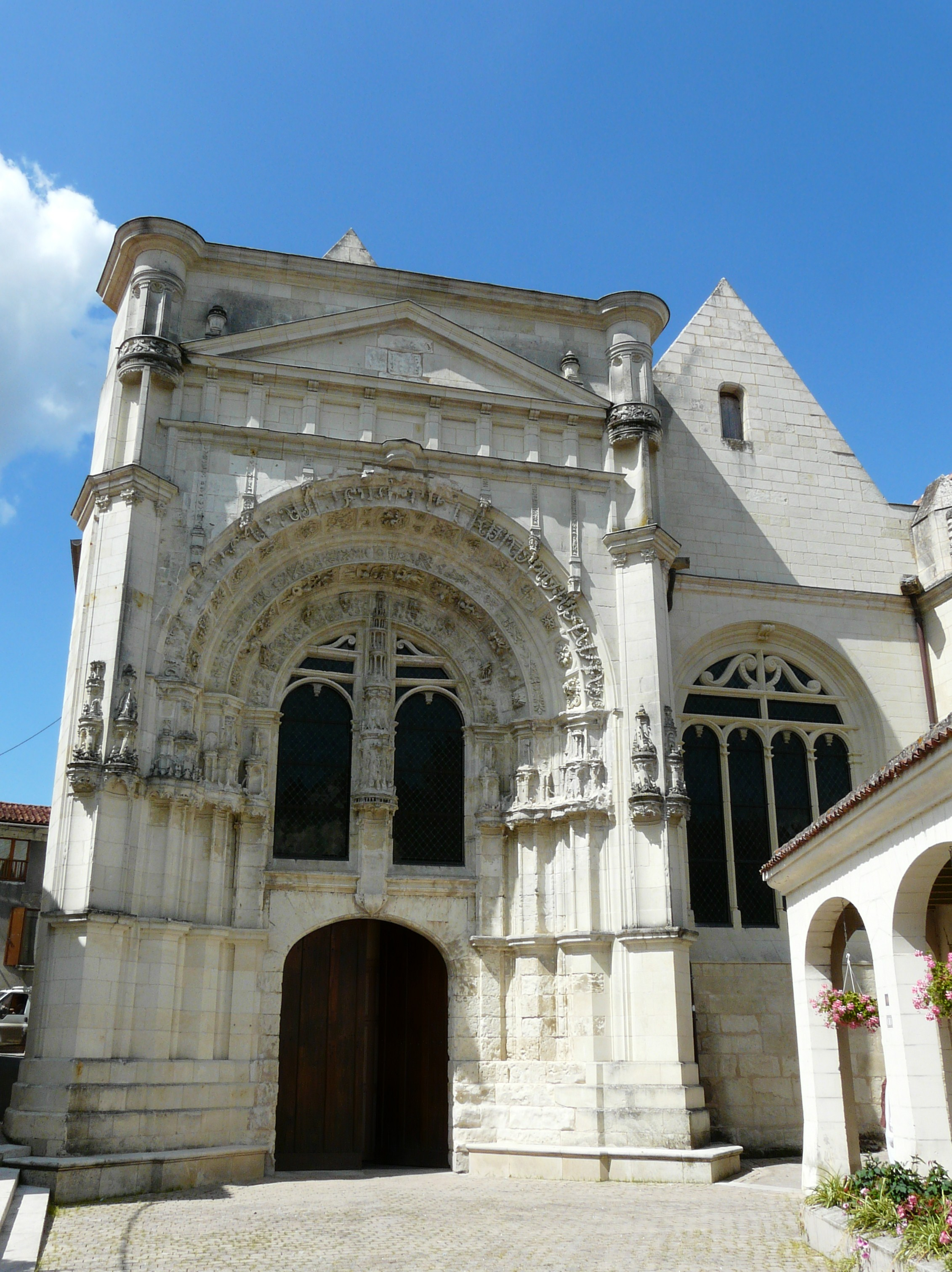 Le portail de l'église Saint-Pierre du marché, Loudun, Vienne, France